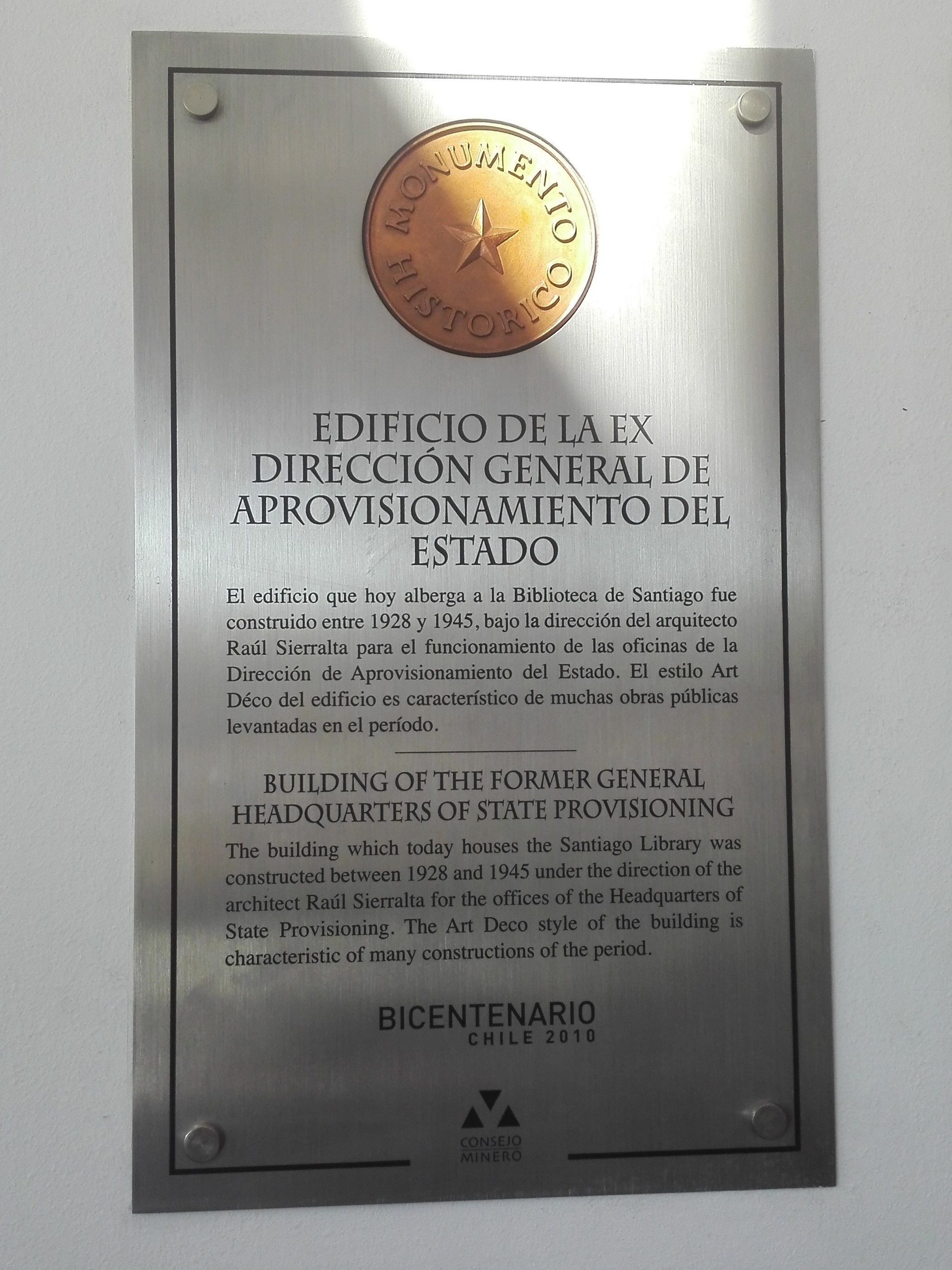 Placa que conmemora la antigua ocupación por la Dirección de Aprovisionamiento del Estado del edificio que hoy alberga a la Biblioteca de Santiago.